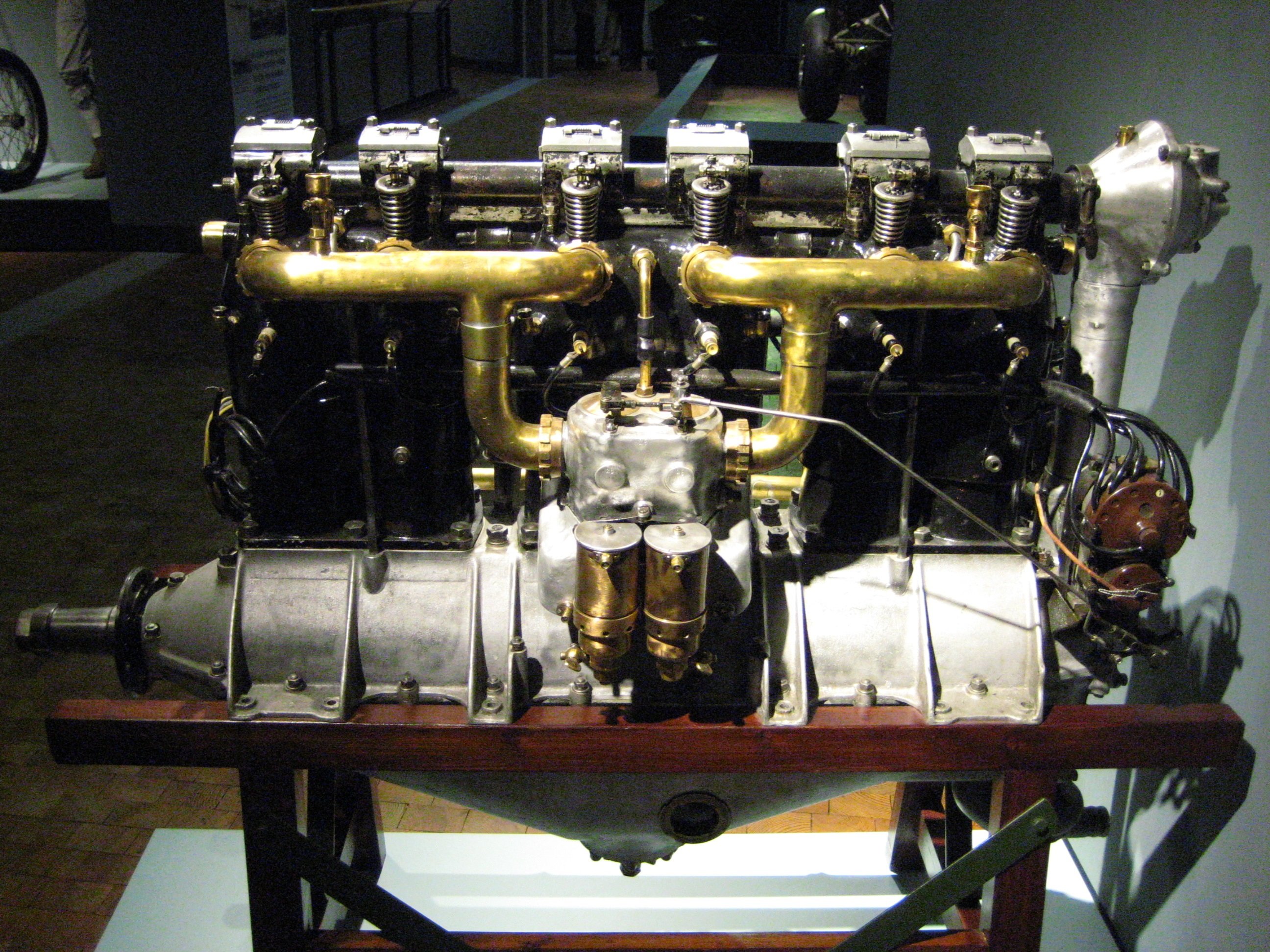 Daimler D II, Flugzeugmotor